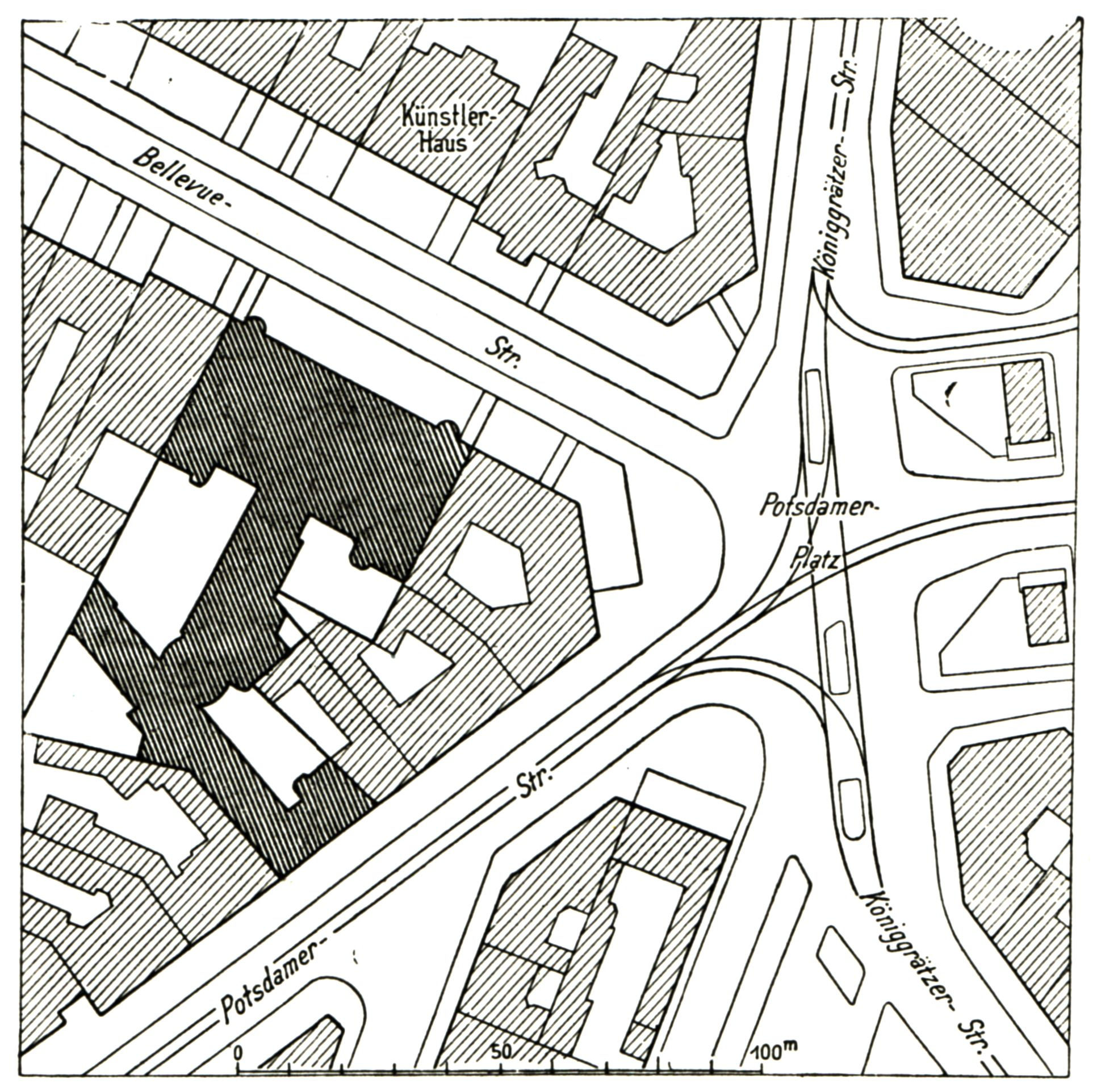 Berlin - Weinhaus Rheingold: Lageplan